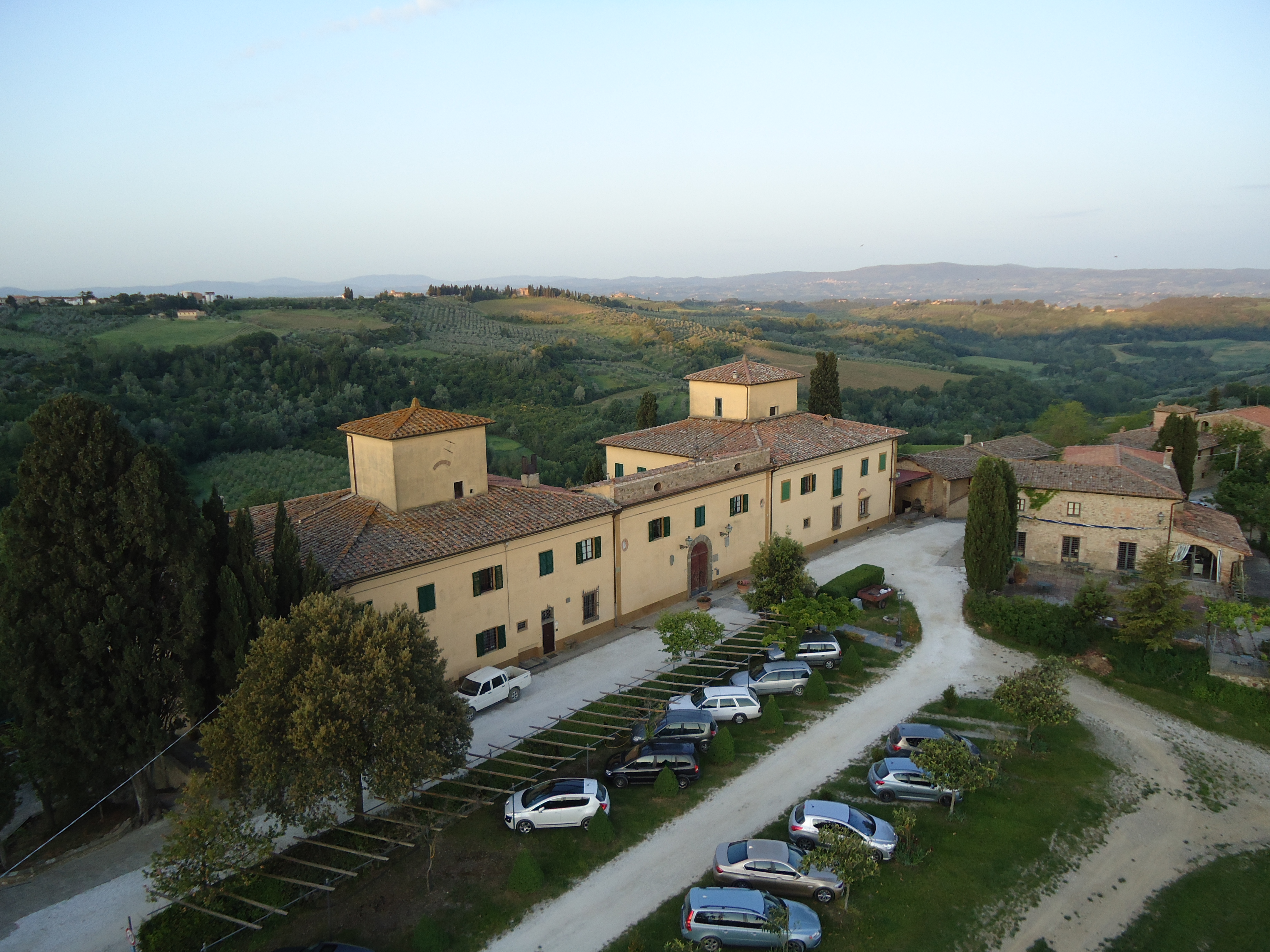 Villa Spoiano facciata nord